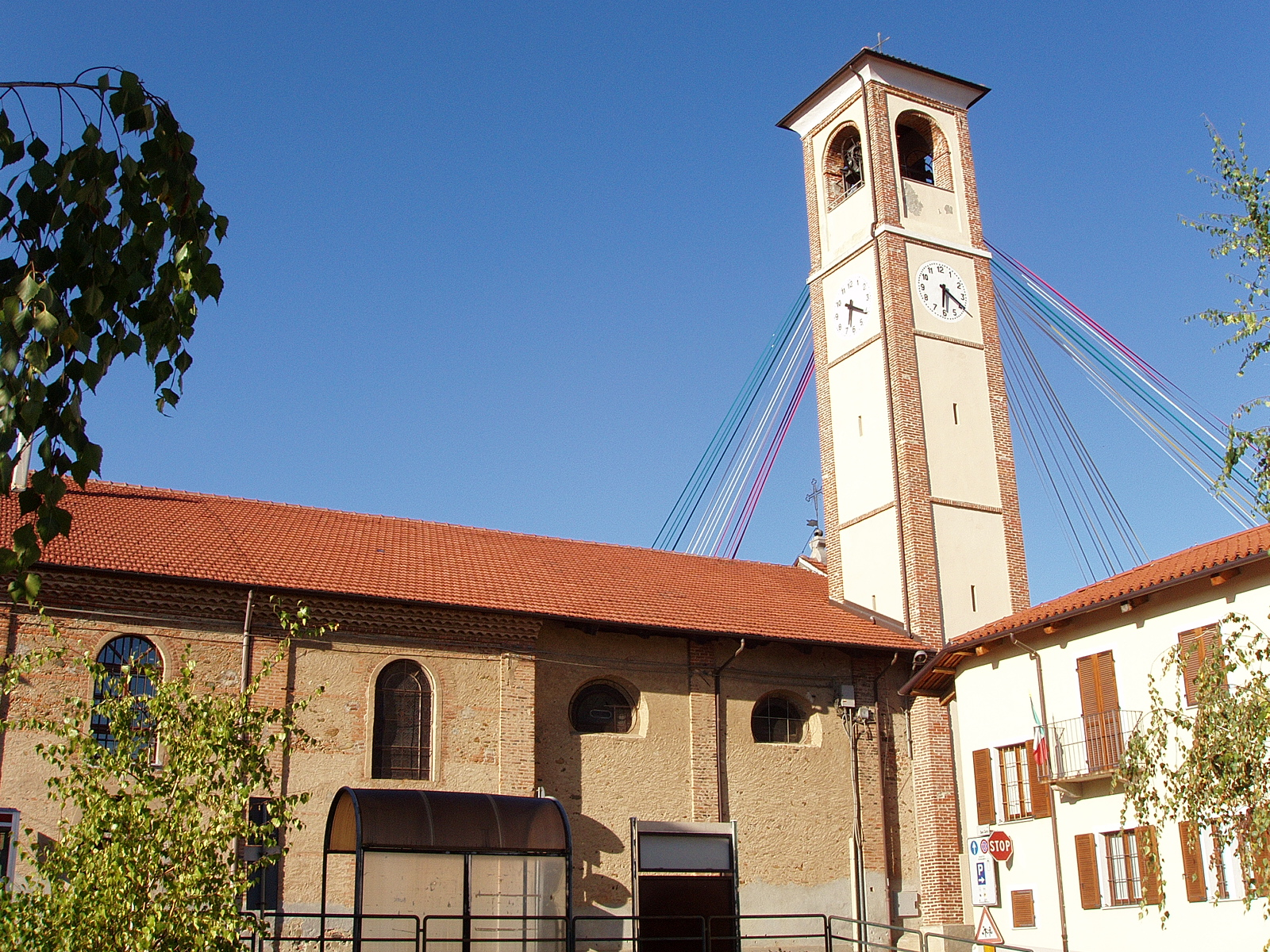 La fiancata della Chiesa Parrocchiale di Vauda Canavese. Si possono notare gli addobbi posti in occasione della festa patronale di San Bernardo di Chiaravalle.